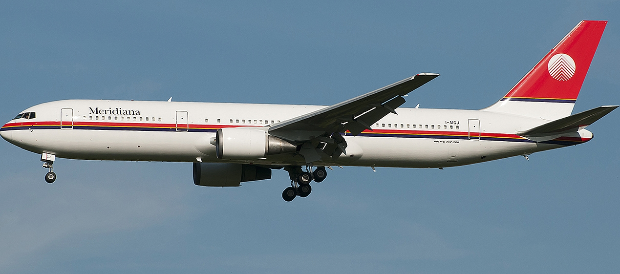 Boeing 767